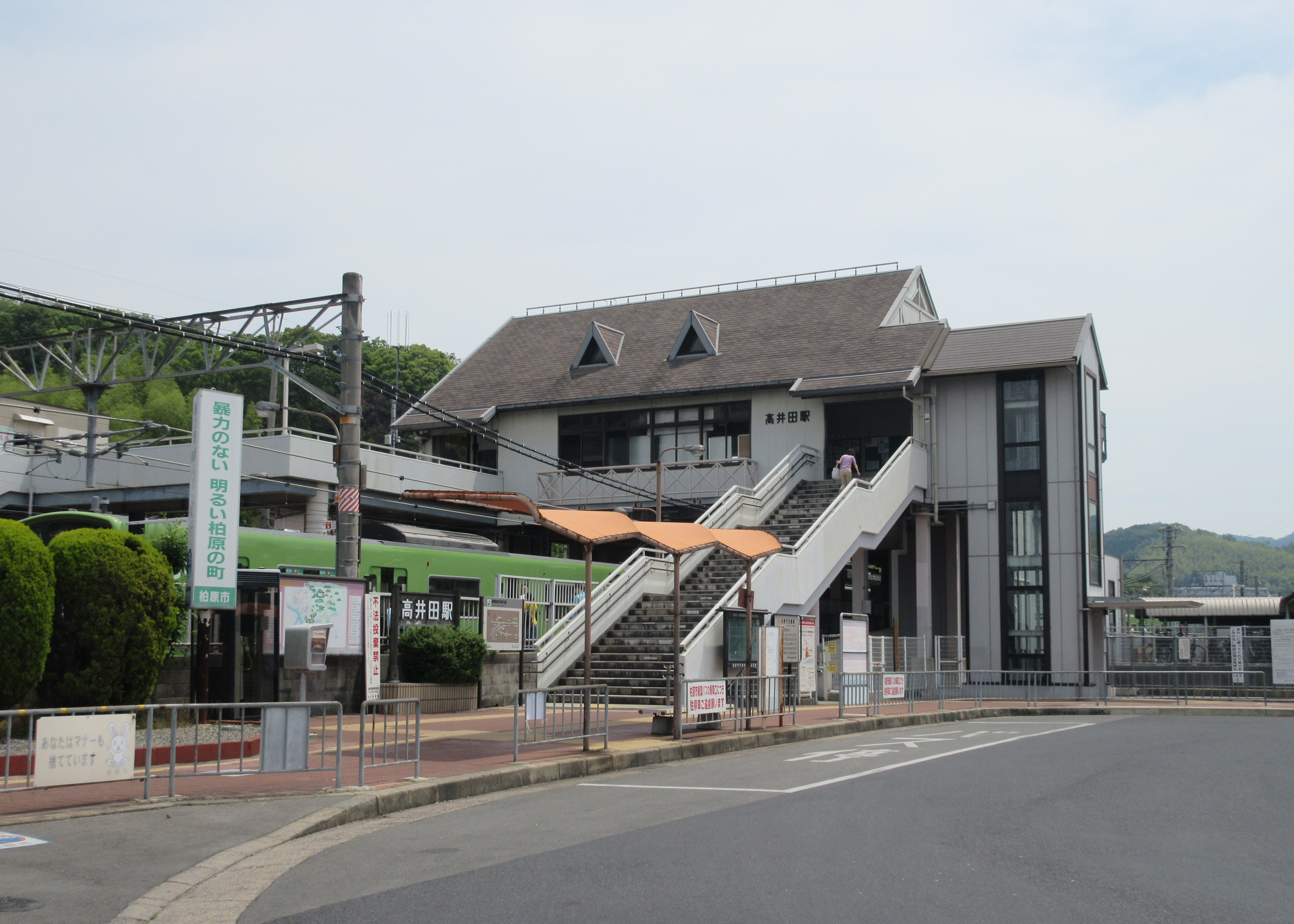 JR高井田駅